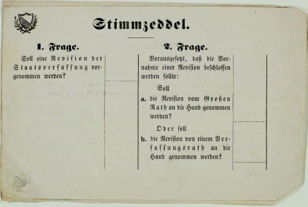 Abstimmung über eine Verfassungsrevision des Kantons Zürich, Stimmzettel vom 26.1.1868